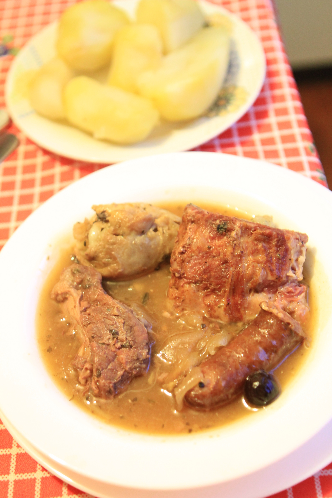 El estofado de San Juan es un plato típico chileno de la zona rural del centro y sur del país. Se prepara justamente la noche de San Juan, el 21 de junio, cuando comienza el invierno. Carnes de diversos tipos, calientes y jugosas, son preparadas para esperar esta fiesta tradicional.